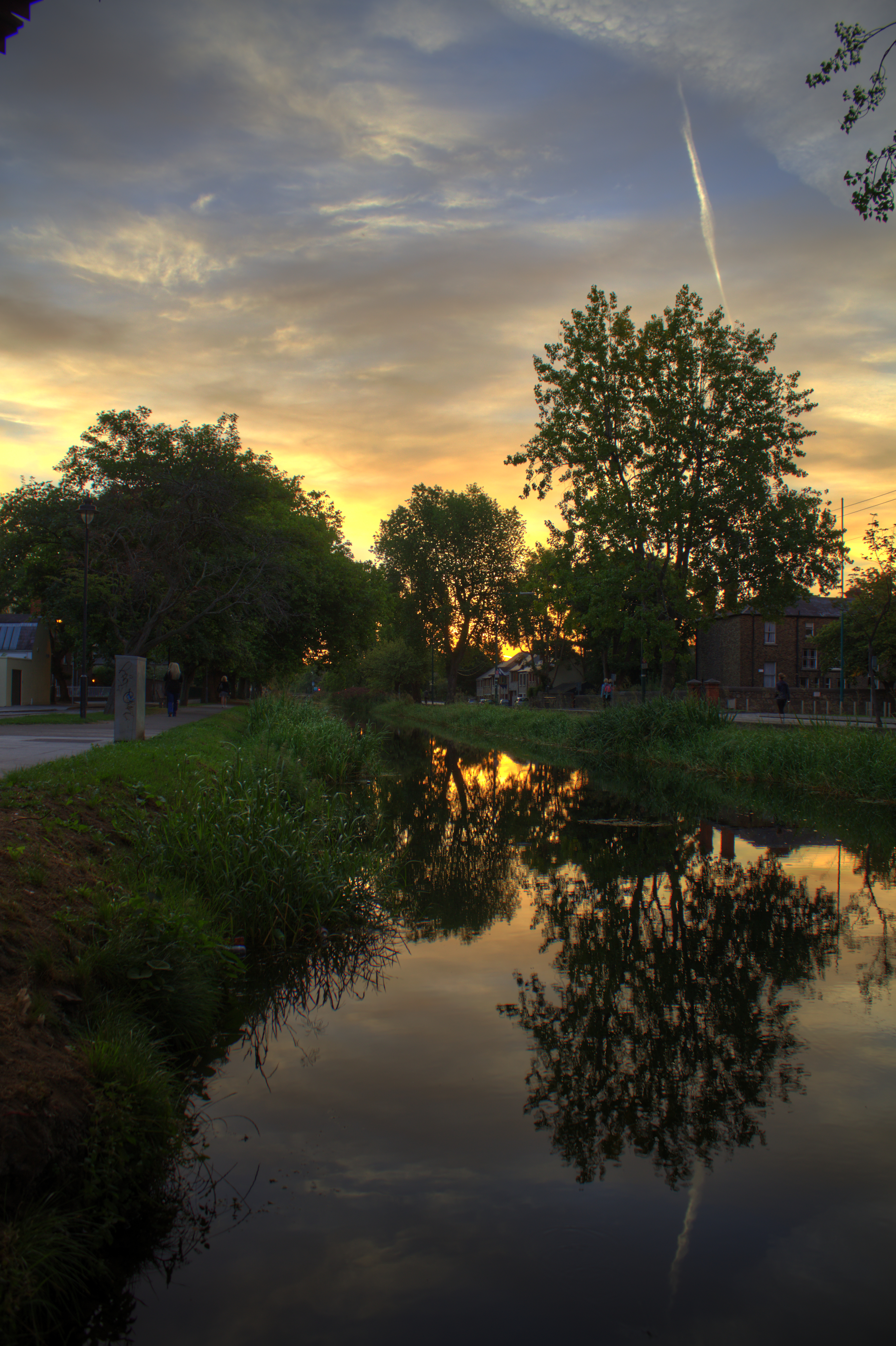 Le Grand Canal sous la stations Charlemont du Luas, a Dublin. 3 photos différentes exposition assemblées avec Luminance HDR